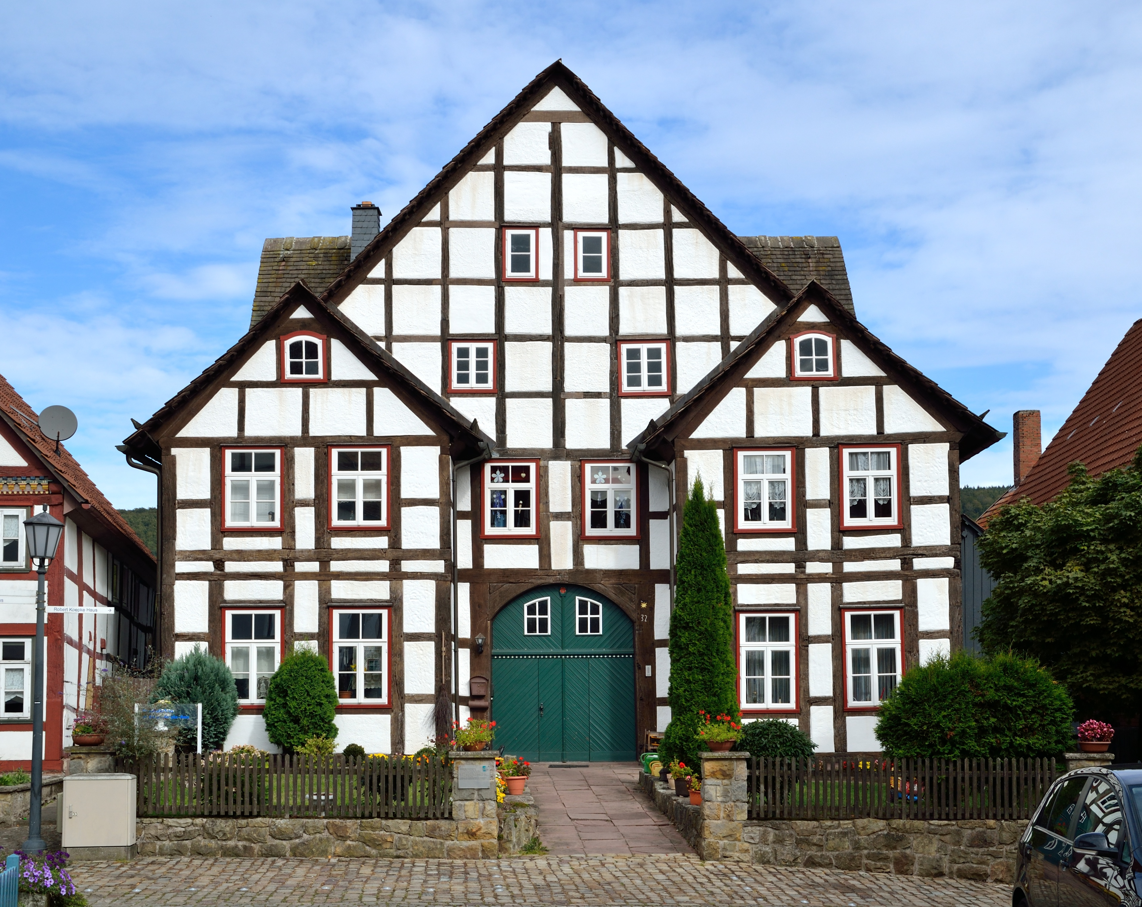 This is a photograph of an architectural monument.